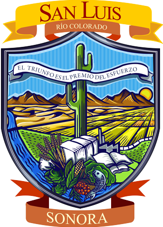 Escudo oficial renovado de San Luis Rio Colorado.